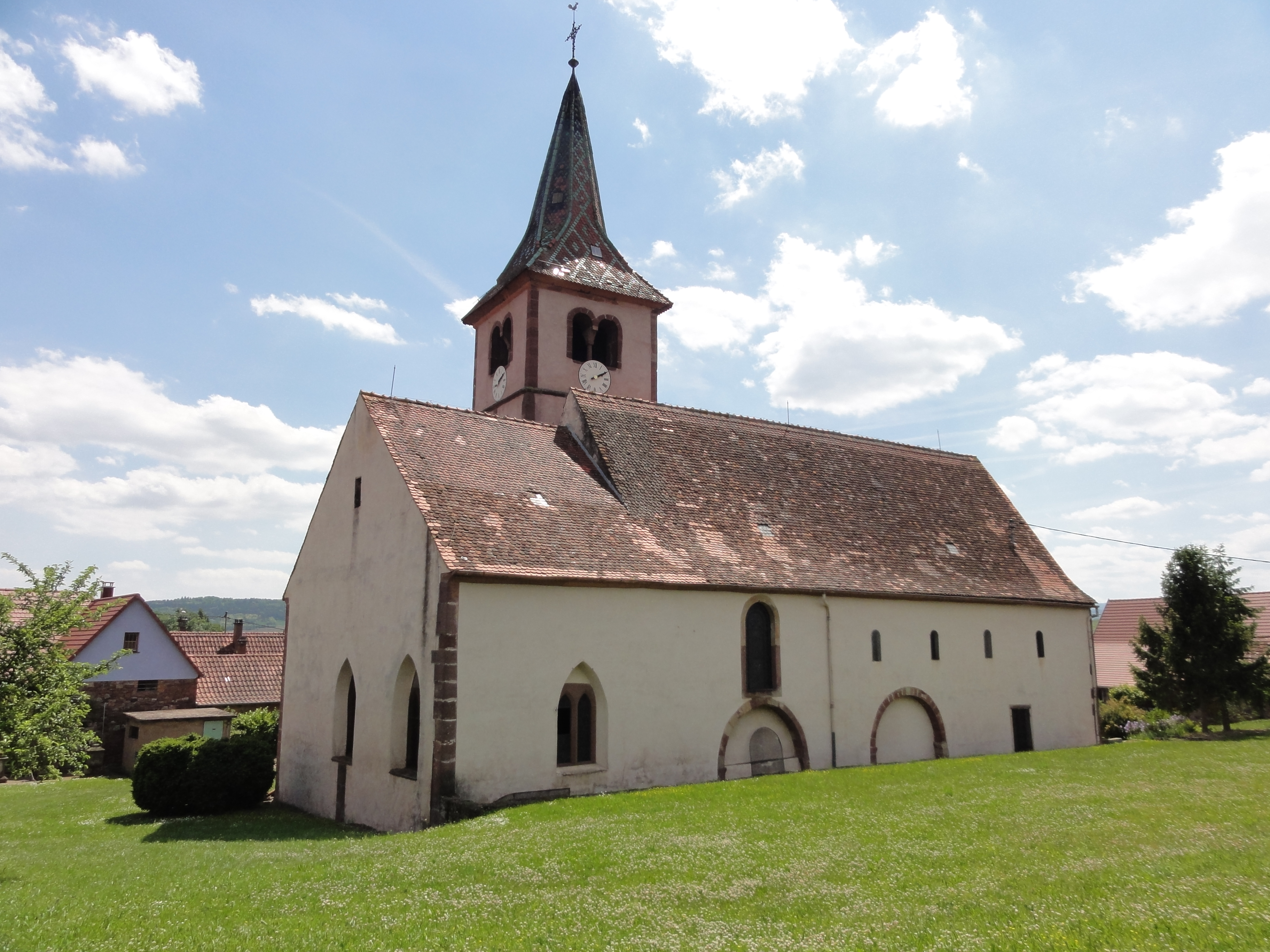 Alsace, Bas-Rhin, Balbronn, Église protestante (PA00085276, IA67006522).